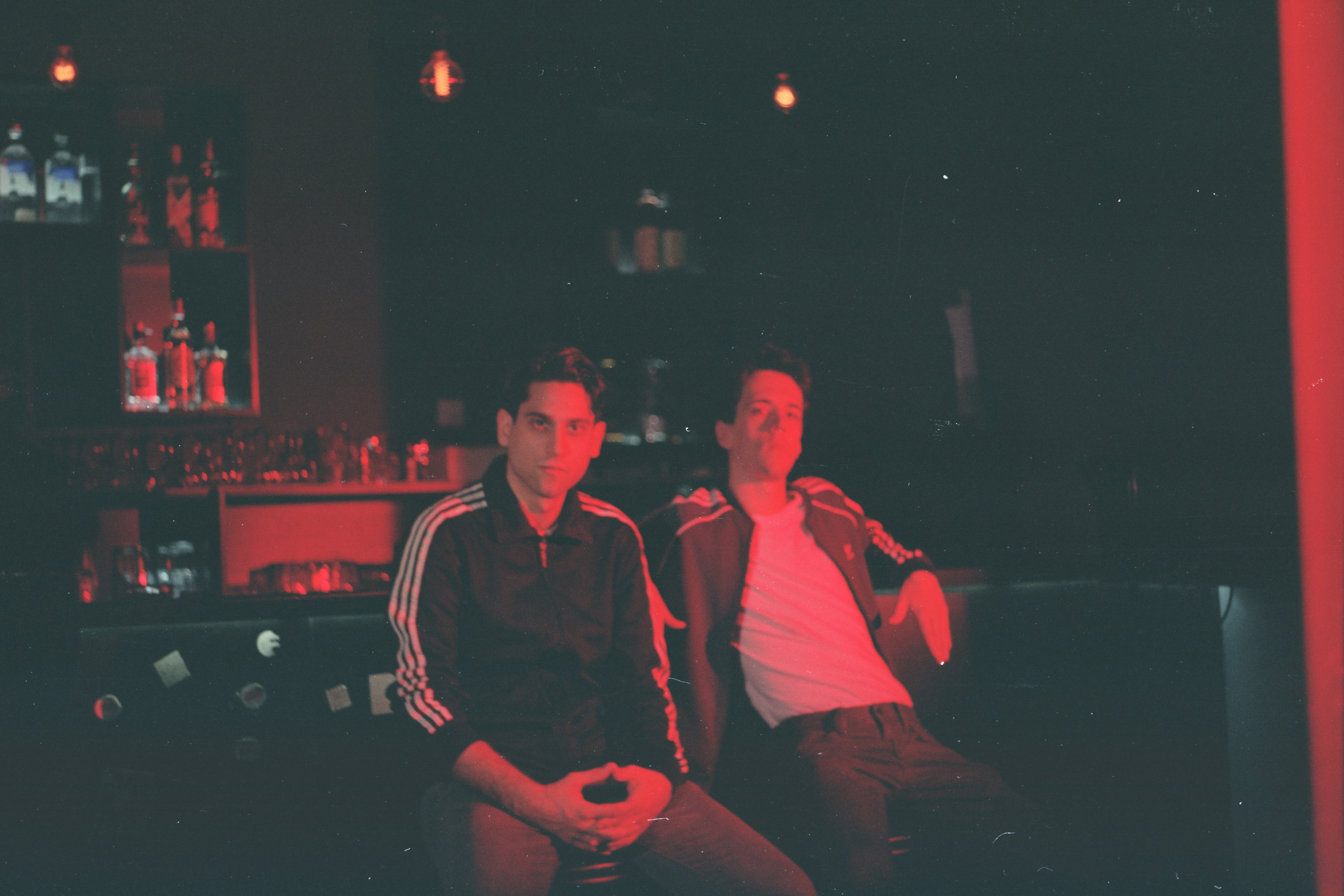 Srpski (latinica): Fotografija članova benda Buč Kesidi iz Pančeva, iz perioda singla Nema ljubavi u klubu.